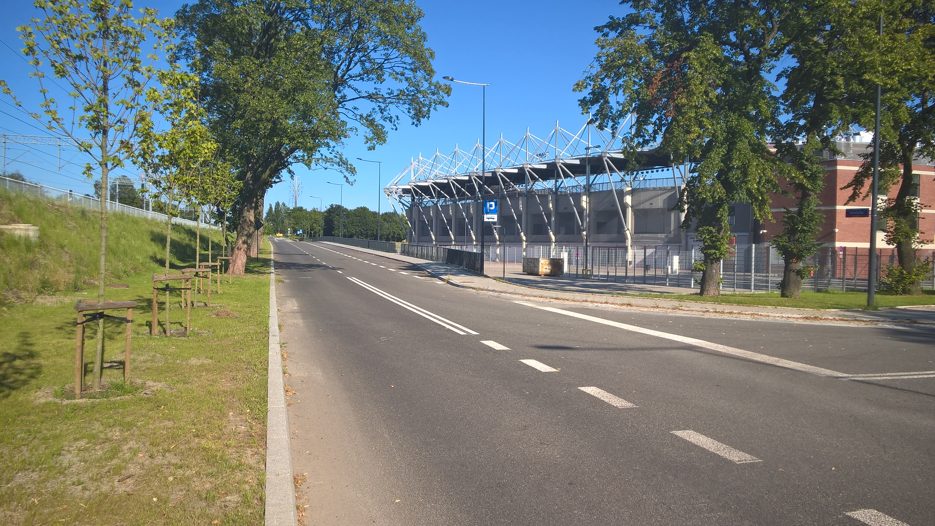 Ulica Włodzimierza Smolarka w Łodzi – widok w kierunku wschodnim. Widoczny stadion Widzewa Łódź (lipiec 2017)